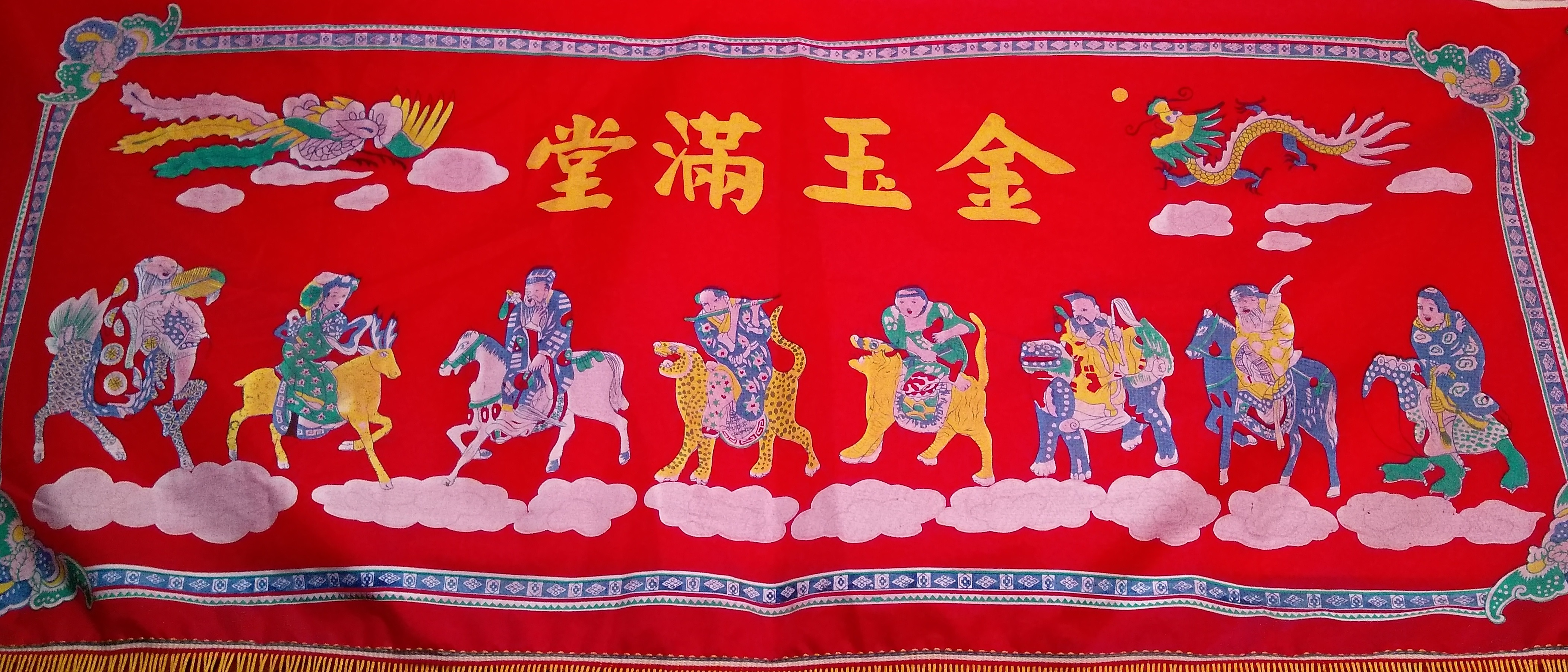 中文（台灣）: 古早紙貼八仙彩